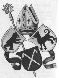 Wappen des Abtes Ulrich Rösch (1426–1491)